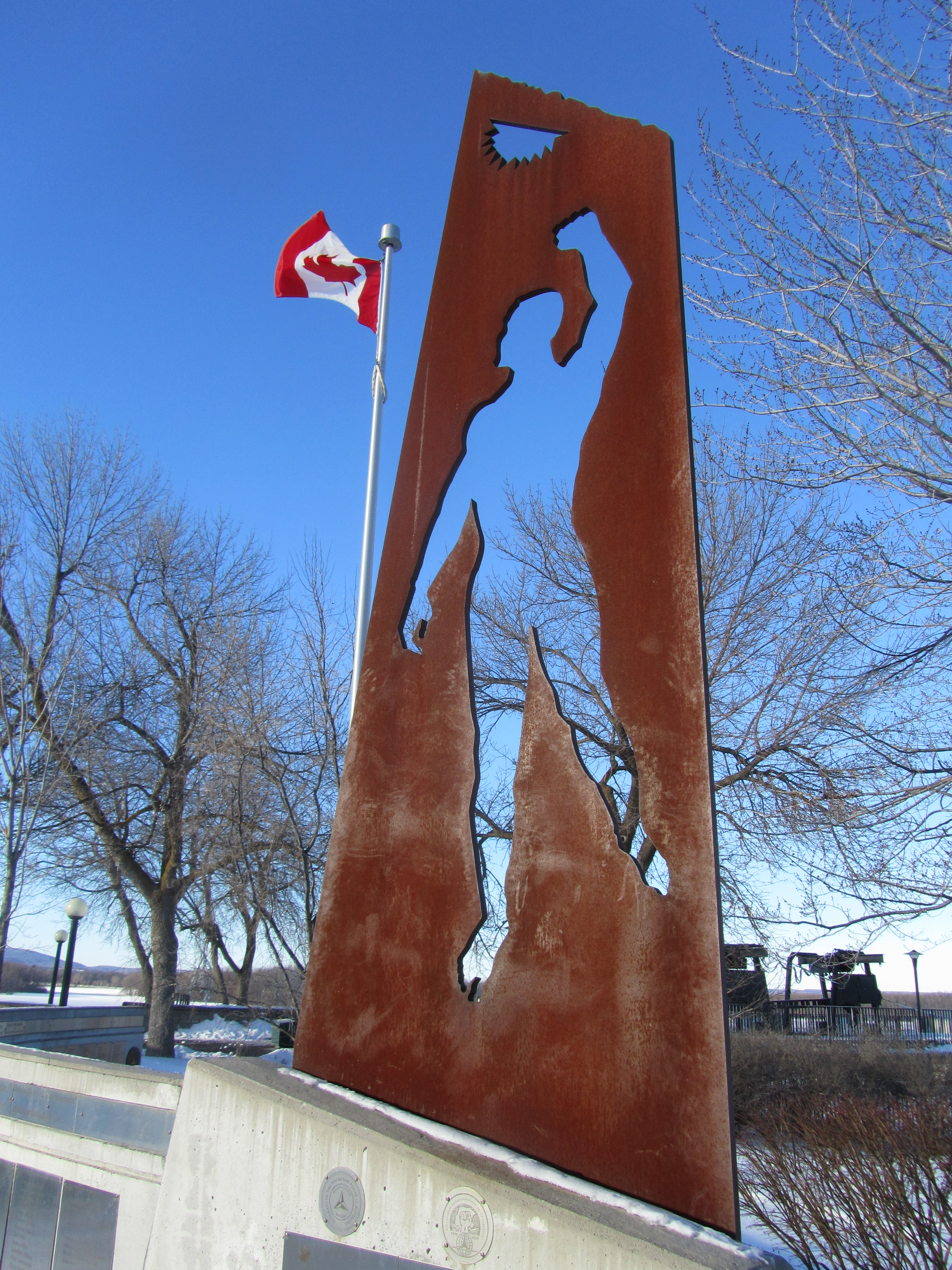 Mackenzie-Papineau Battalion